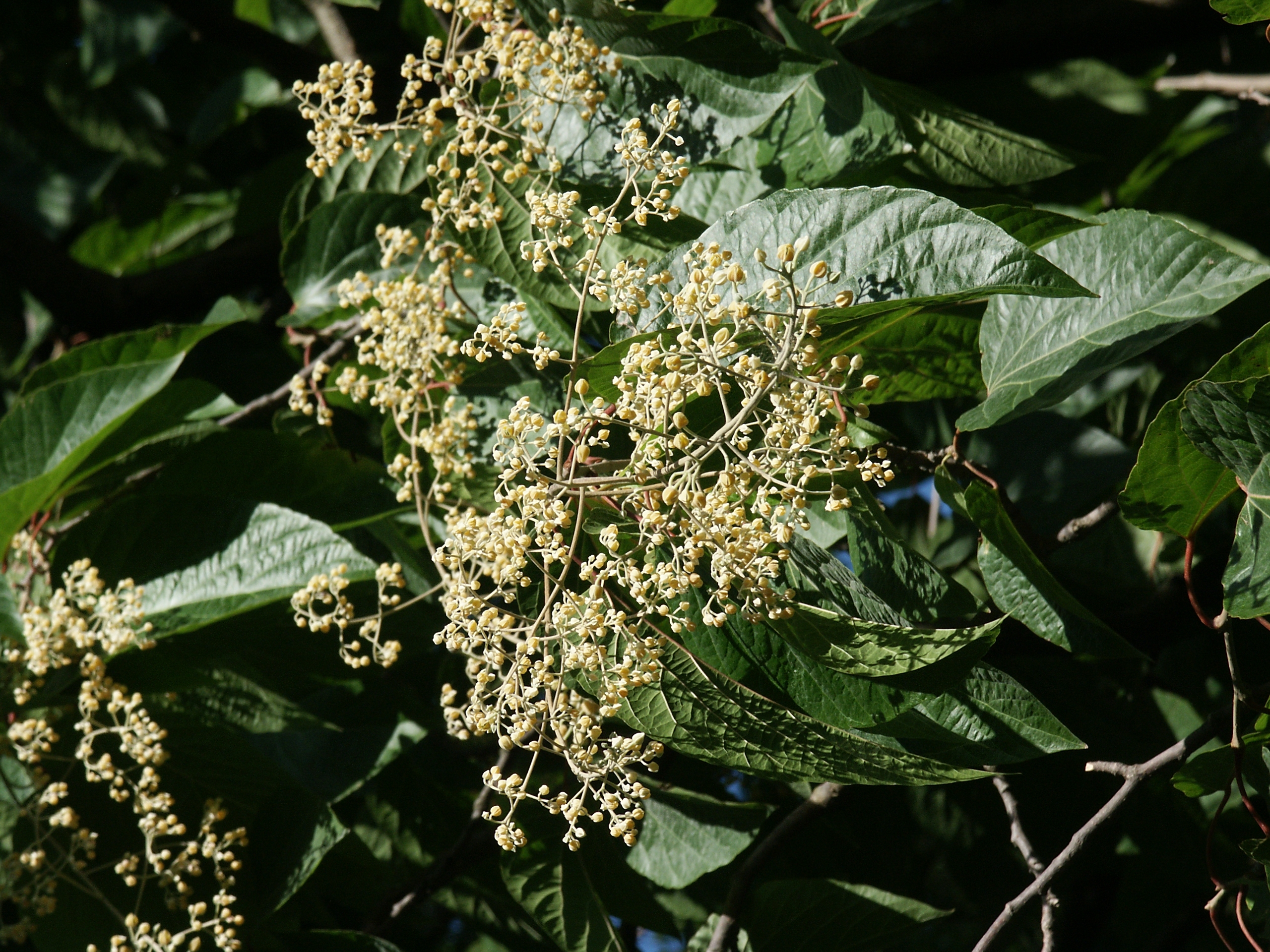 Inflorescence de Poliothyrsis sinensis - Jardin des Plantes, Paris France